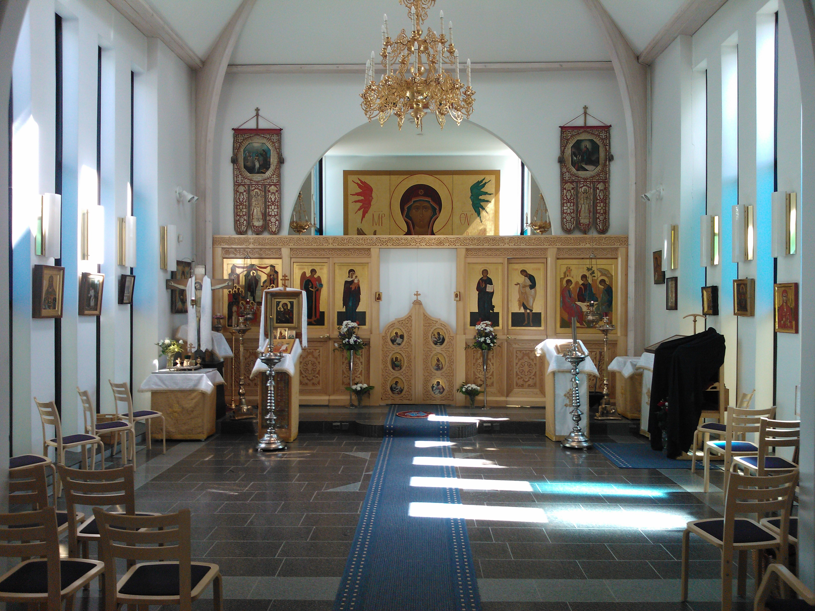 Линтульский монастырь, Финляндия